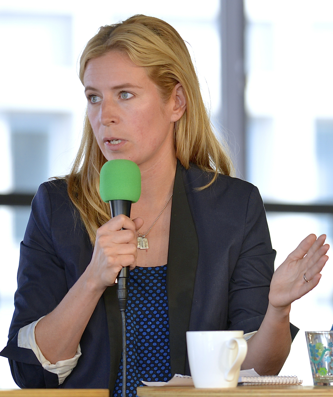 Karin Pettersson i P1 Ekots Valspecial kommenterar frågorna inför valet. Plats: Kulturhuset Stadsteatern den 13 september 2014.